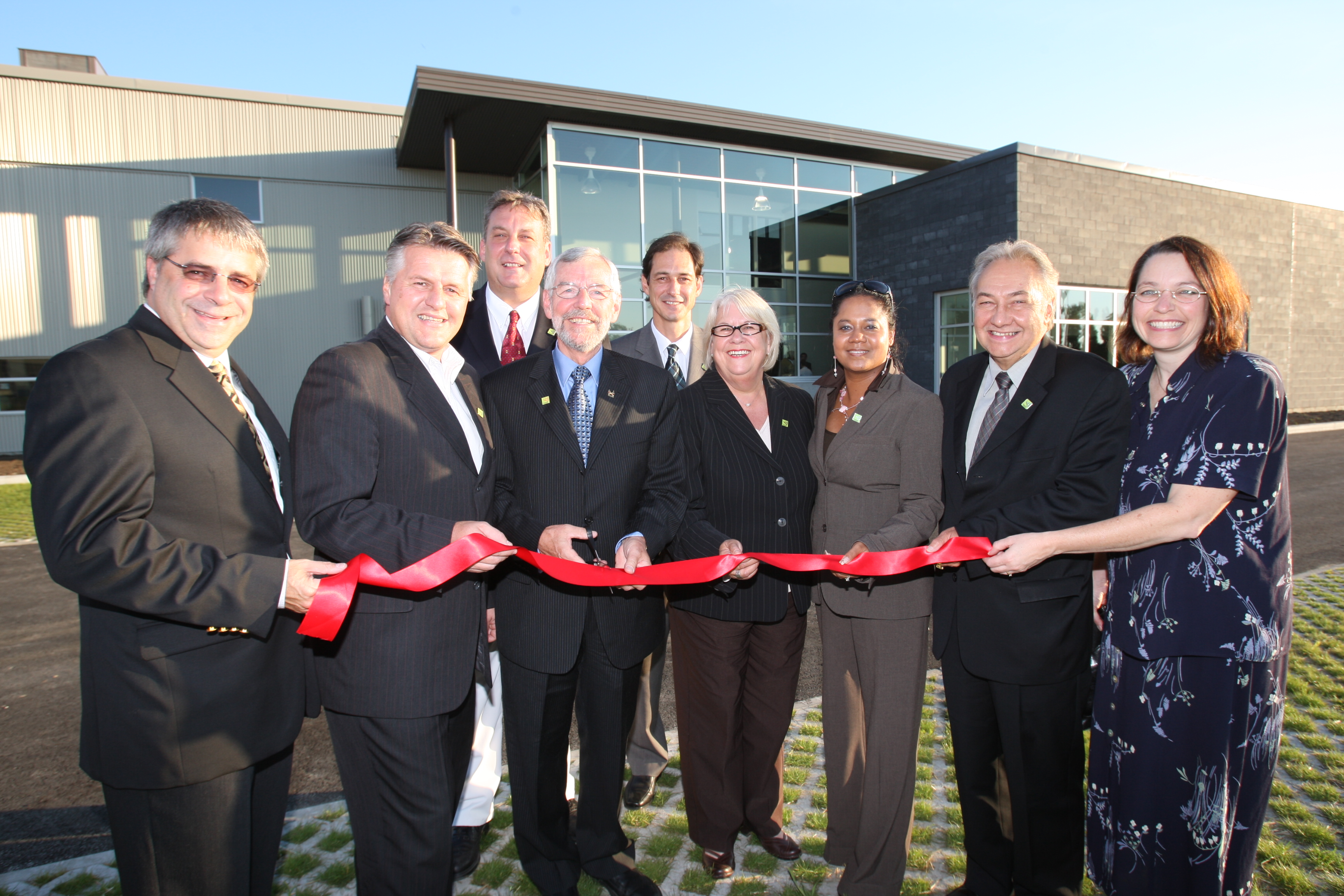 Inauguration du troisième pavillon du CDB à Saint-Hyacinthe au Québec, dans la Municipalité régionale de comté des Maskoutains, dans la région administrative de la Montérégie.